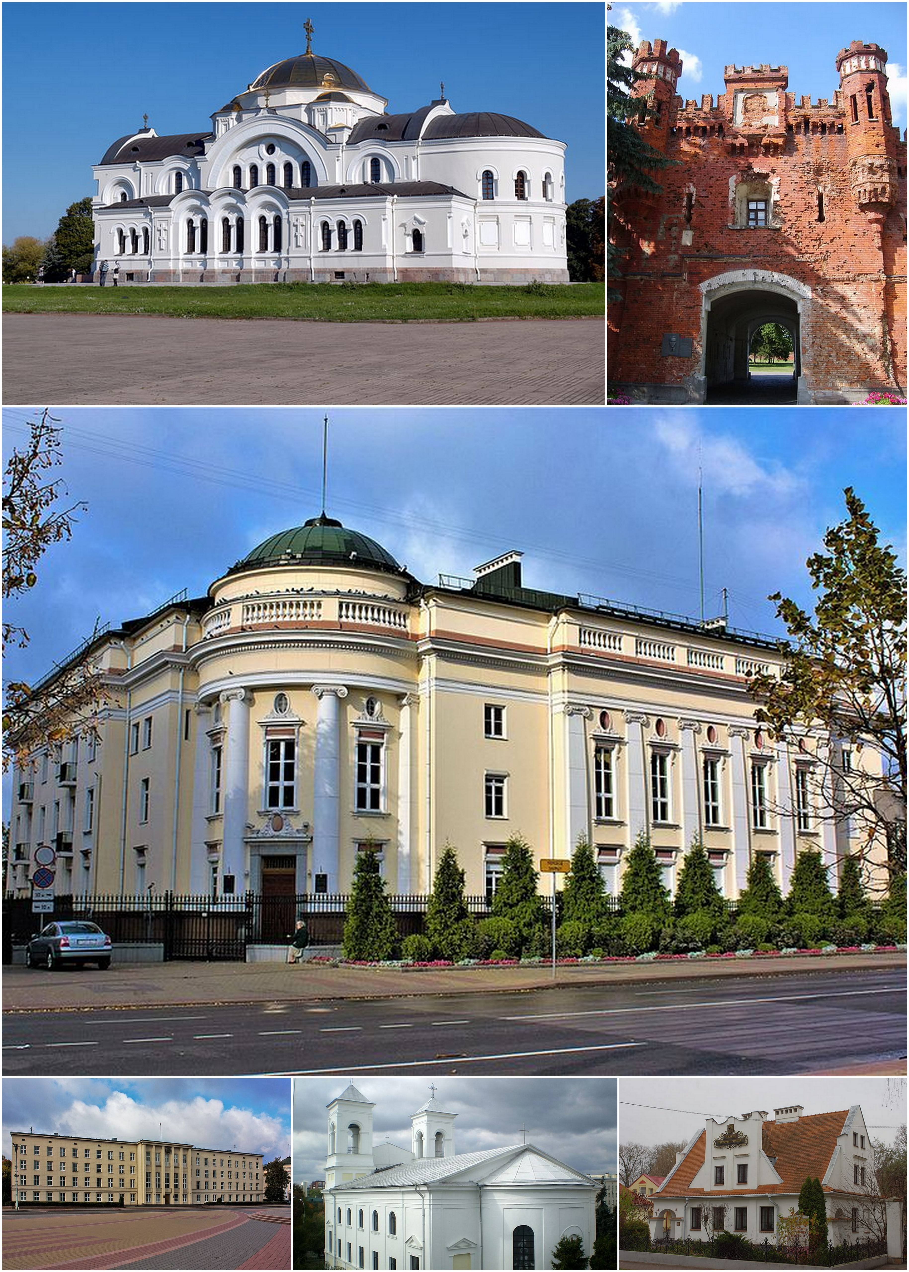 Калаж для артыкулаў пра Брэст з фотаздымкаў